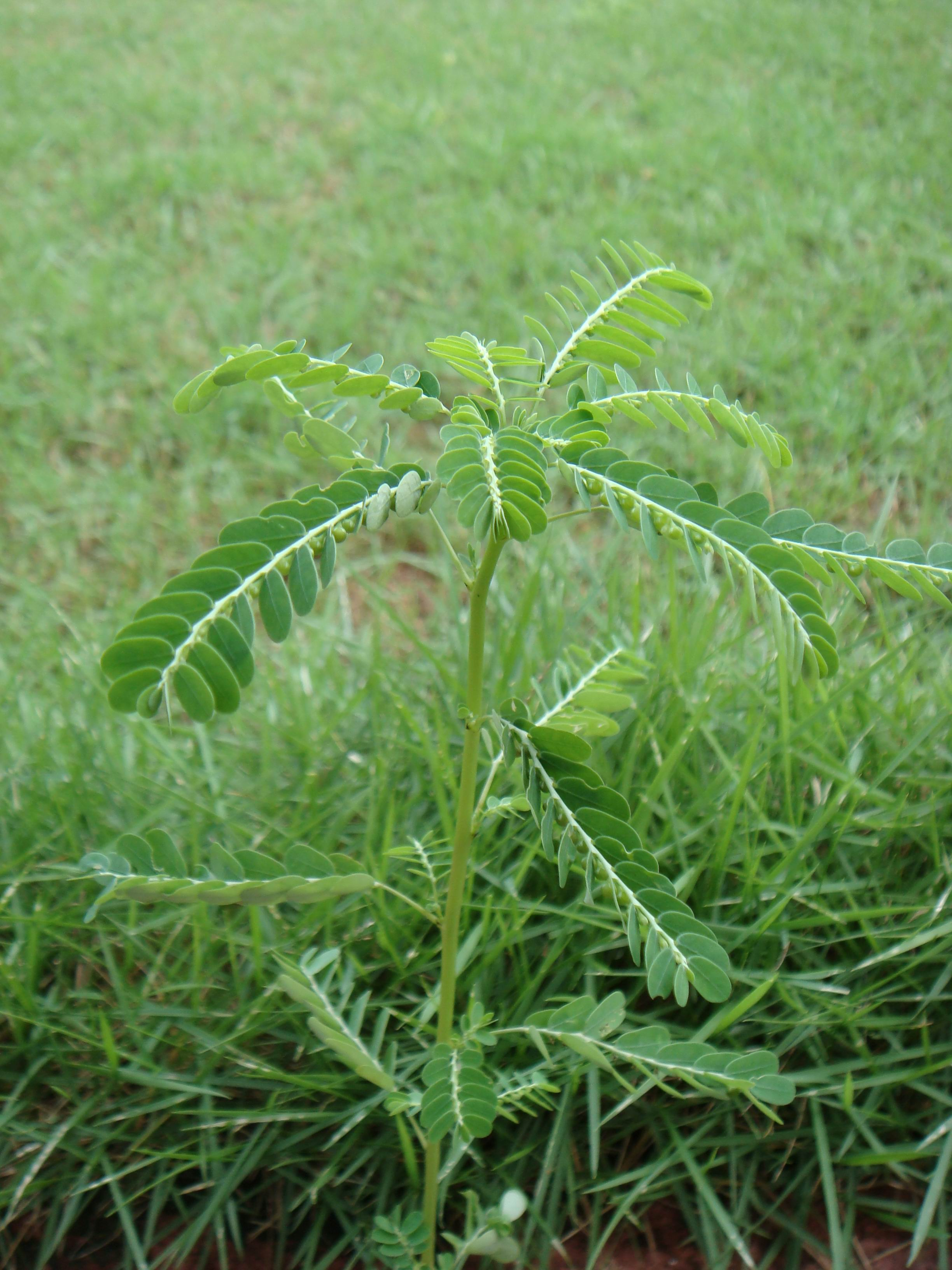 കീഴാർനെല്ലി